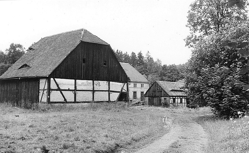 Original image description from the Deutsche Fotothek Großhennersdorf-Euldorf. Eulmühle